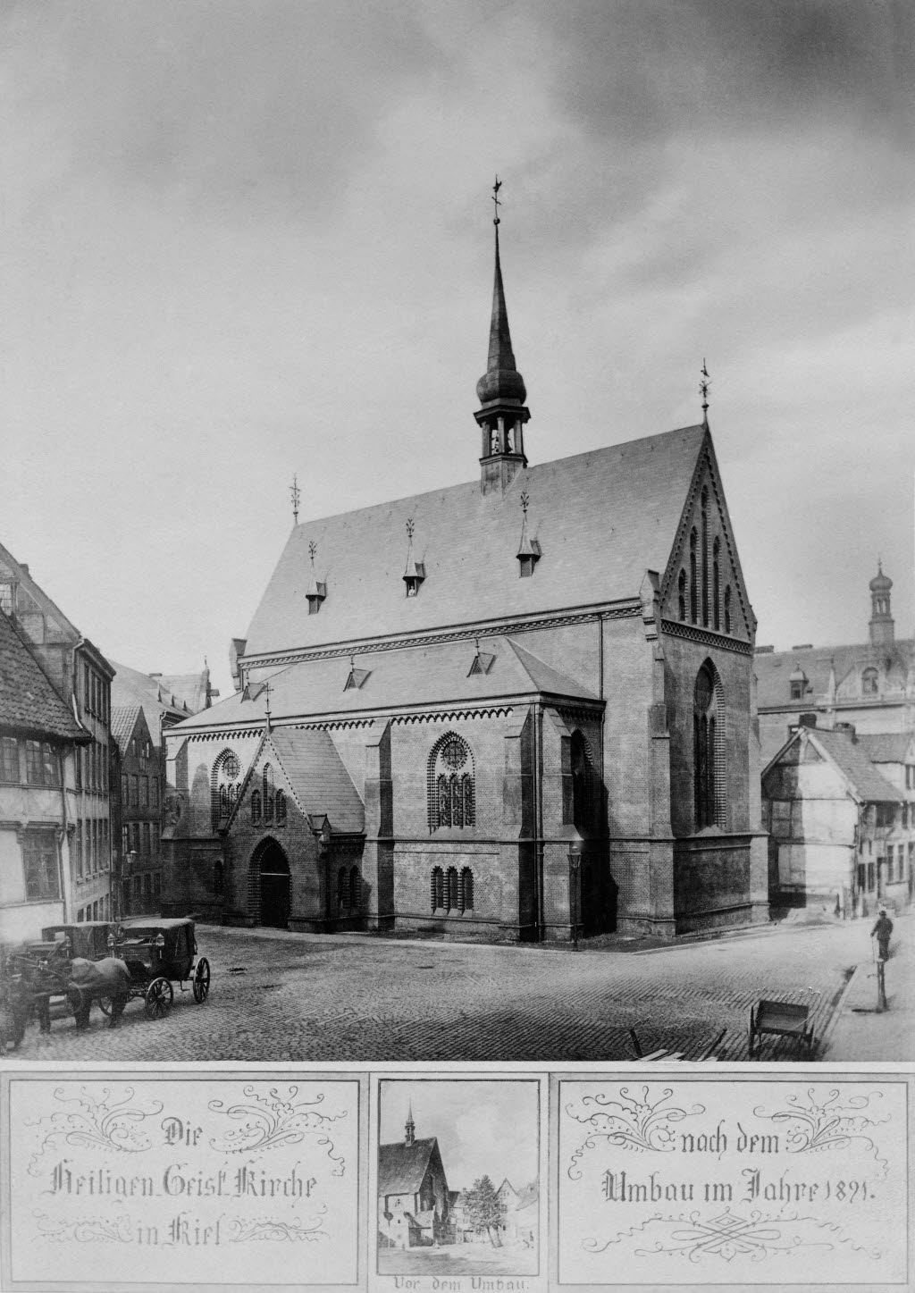 nach dem 1889/91 erfolgten neugotischen Umbau durch Stadtbaumeister Wilhelm Schweitzer.